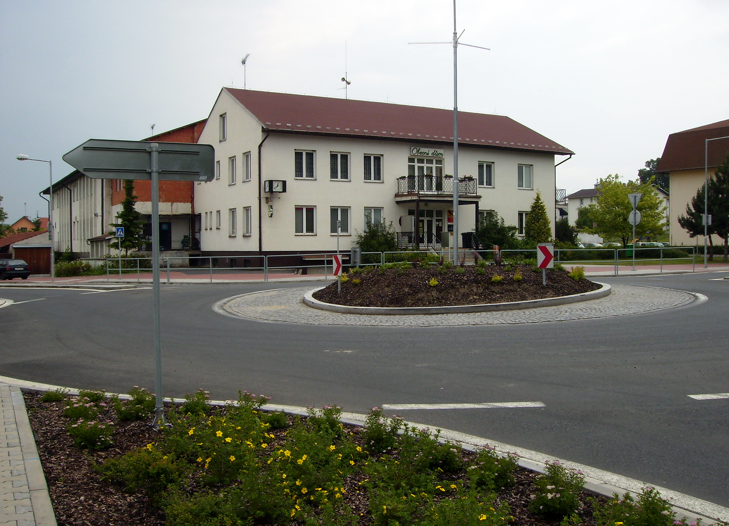 Kruhový objezd v centru Radimi, v pozadí obecní dům.